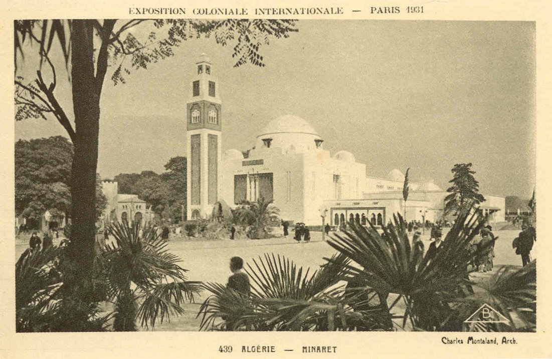 Pavillon de l'Algérie à l'Exposition Coloniale de Paris en 1931